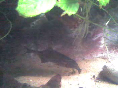 Campylomormyrus tamandua